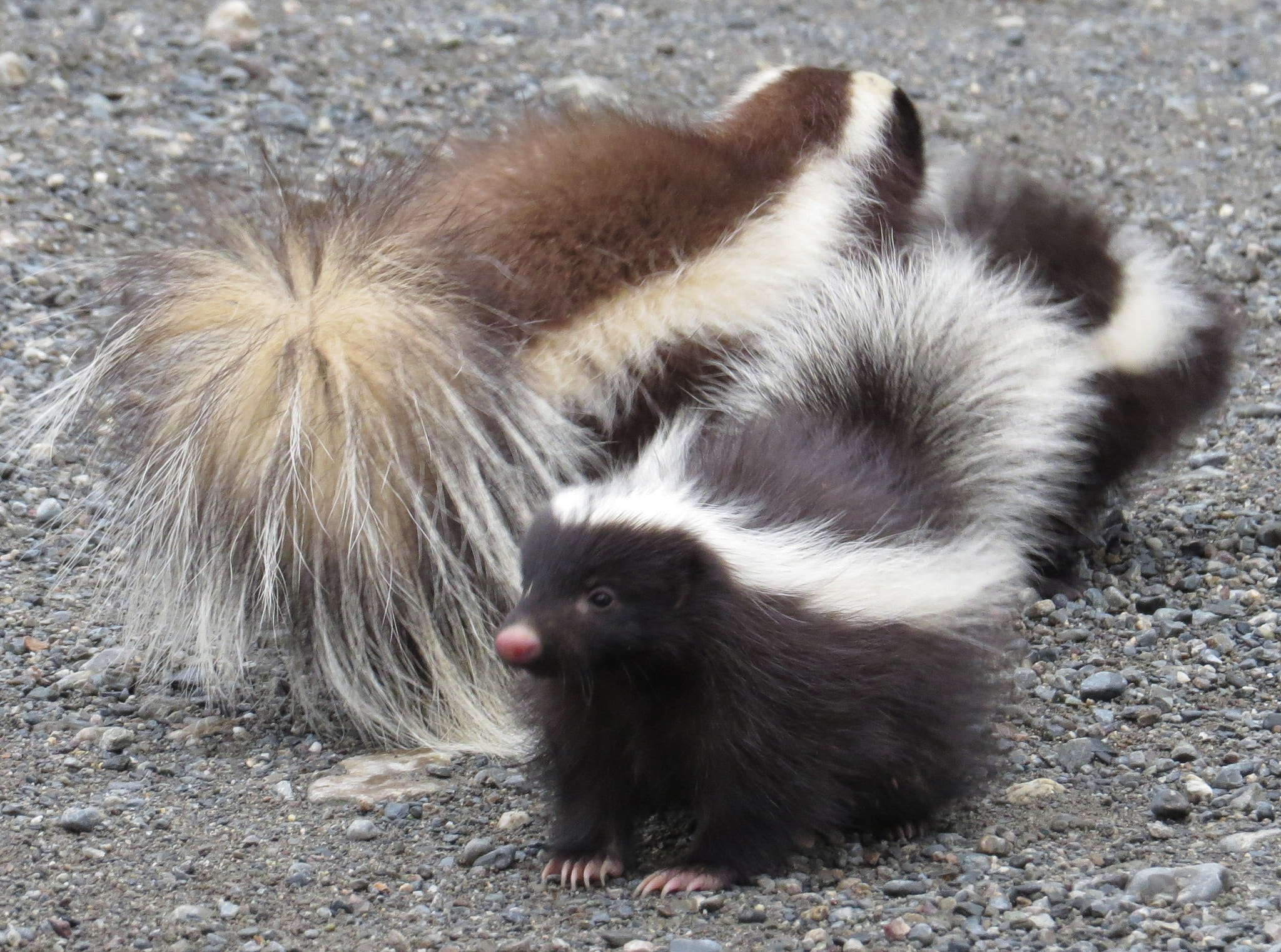 500px provided description: Chingue de la patagonia o zorrillo,estos estaban en las cercanias de Villa Ohiggins [#patagonia ,#zorrillo ,#chingue]